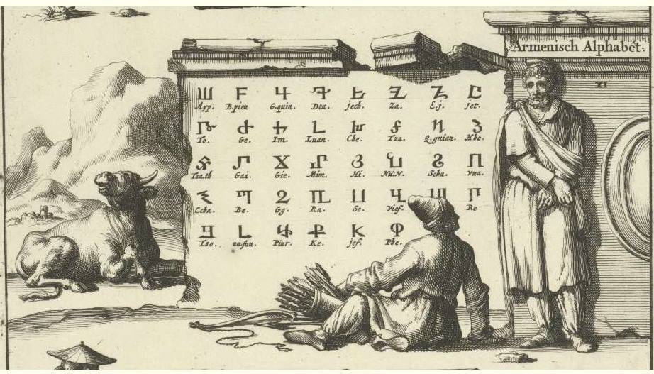 Յան Լույկենի «Հայոց այբուբենը» փորագրանկար, 1690 թ.